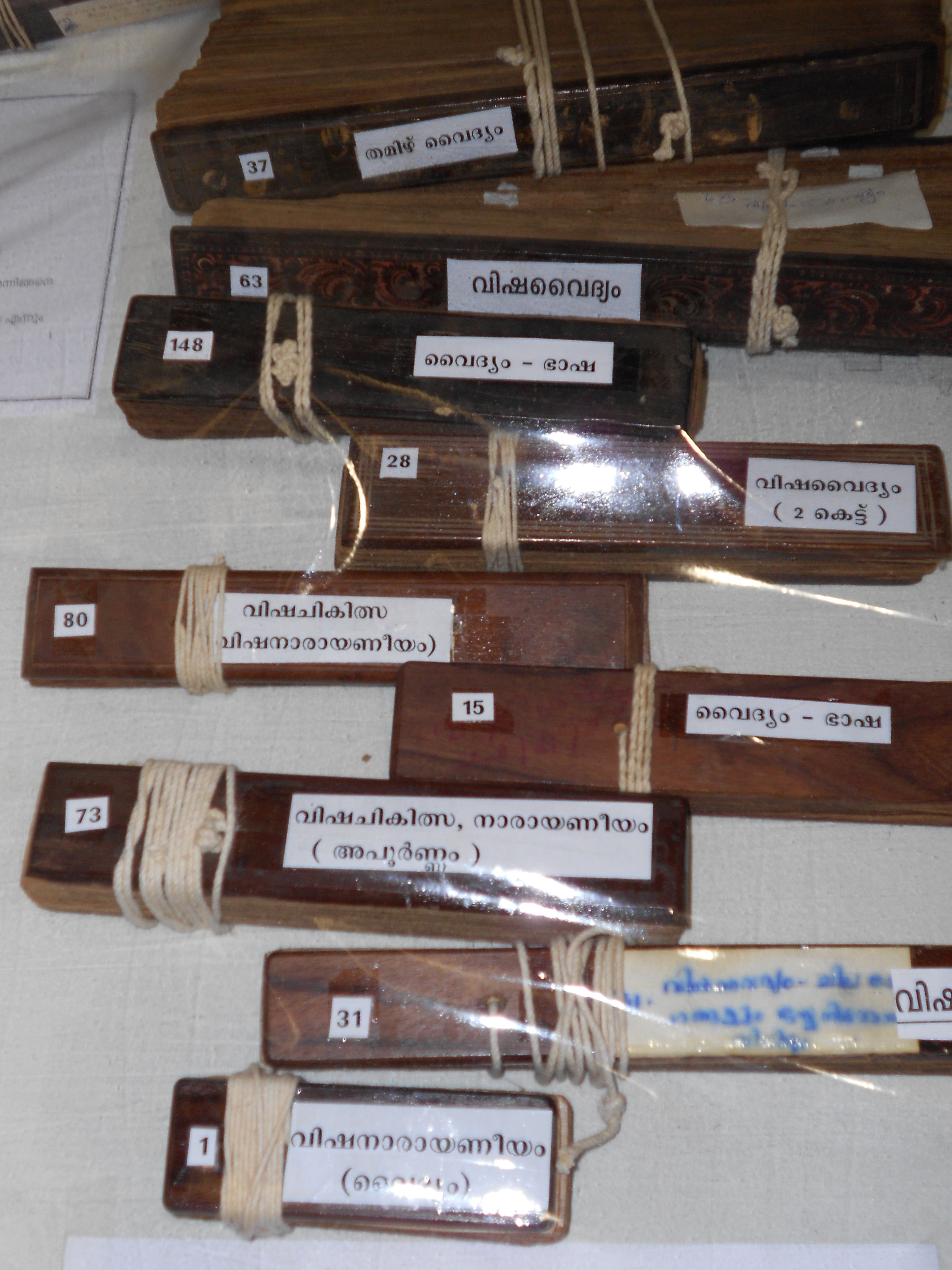 Thaliyola